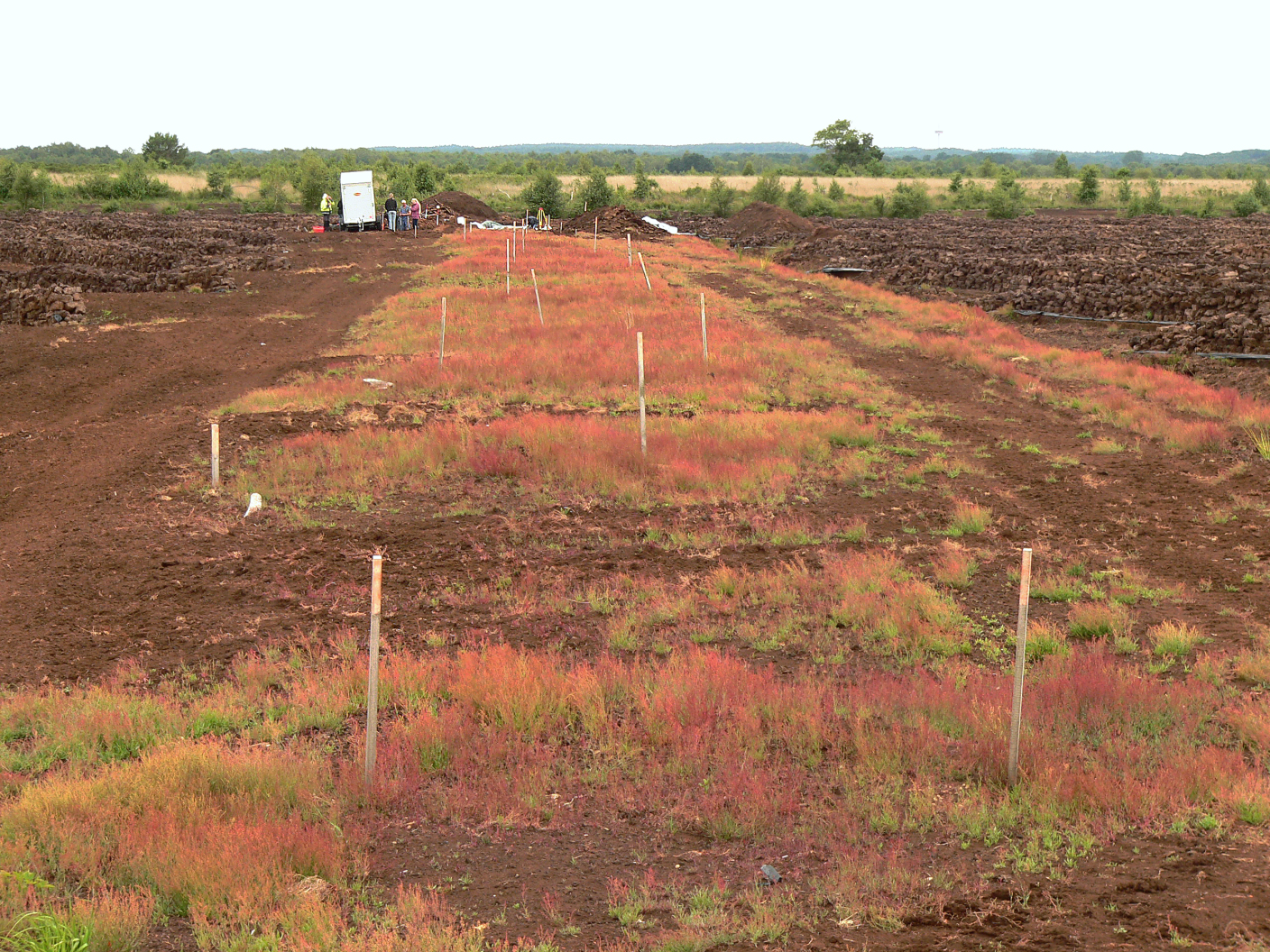 Ausgrabung des Moorweges im Aschener Moor, Trassenmarkierung des Moorweges im Untergrund, Blick zur Geest